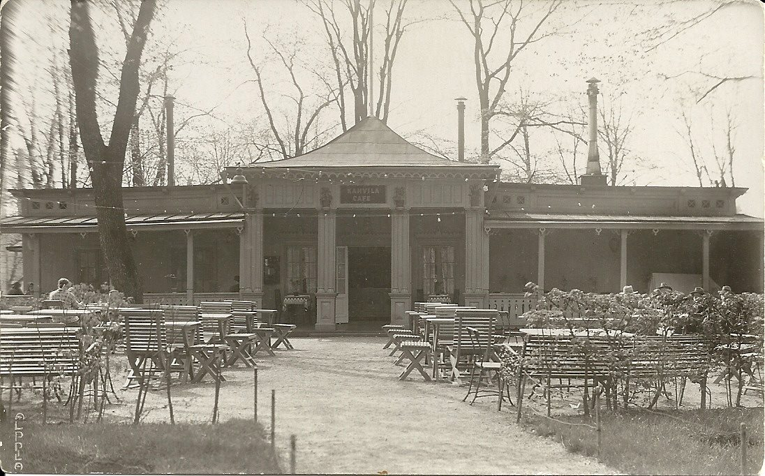 Pinella ravintola Turussa vuonna 1932